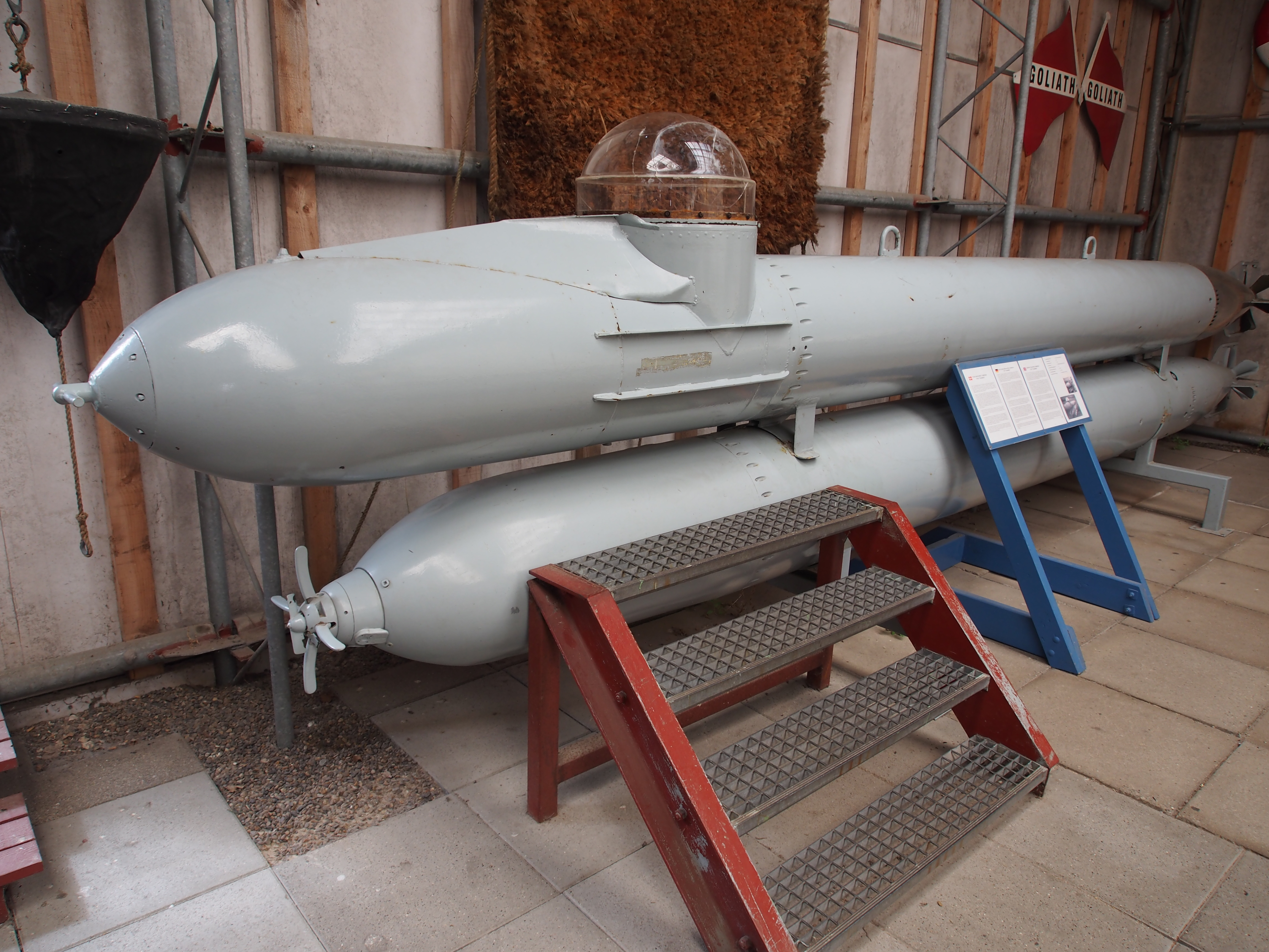 Photographed at Aalborg Søfarts- og Marinemuseum, Denmark.